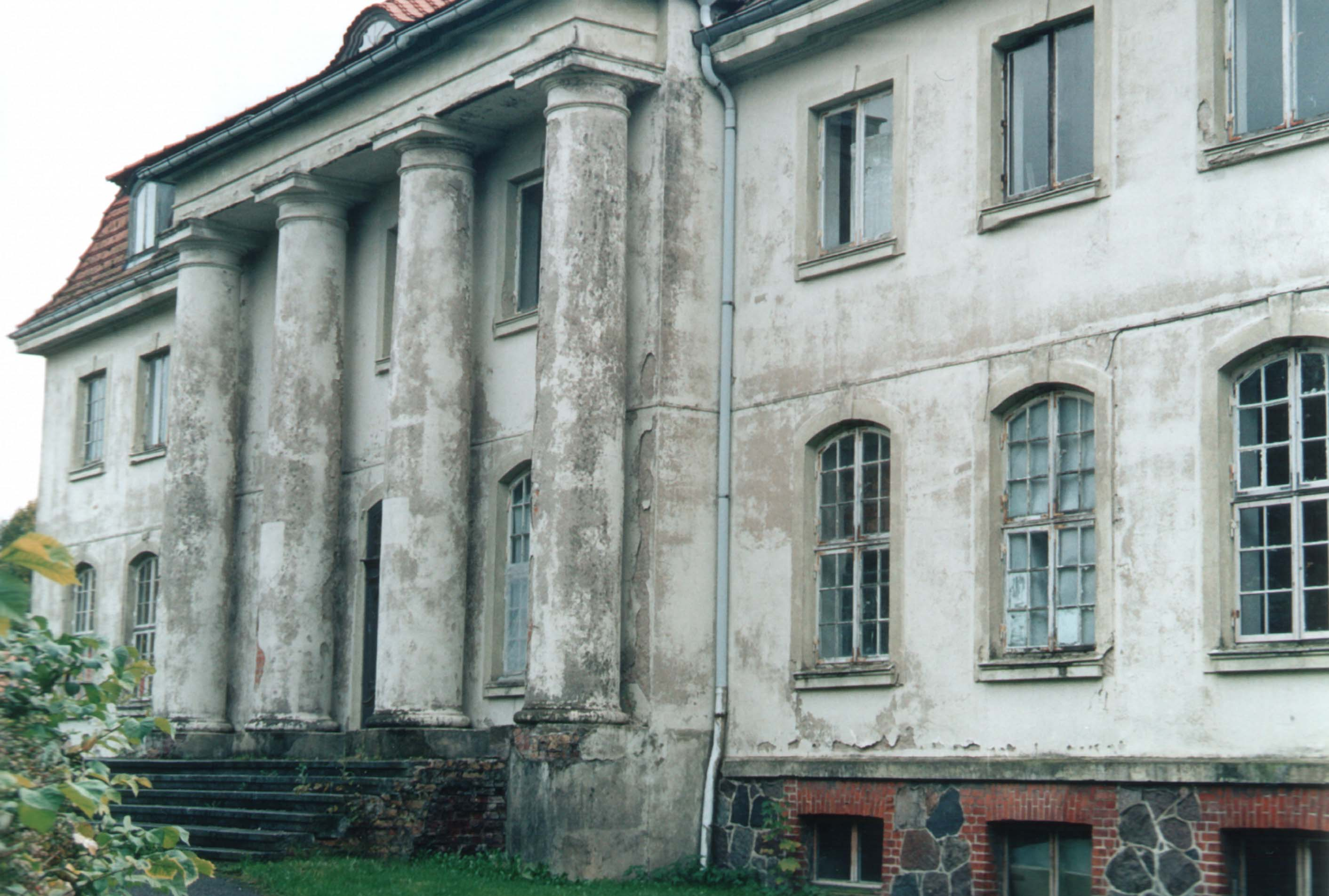 Vormaliges Herrenhaus der Familie v. Plessen zu Damshagen Datum: 10/2003 Urheber: Michael Pfeiffer alias Gordito1869 Quelle: privates Fotoalbum